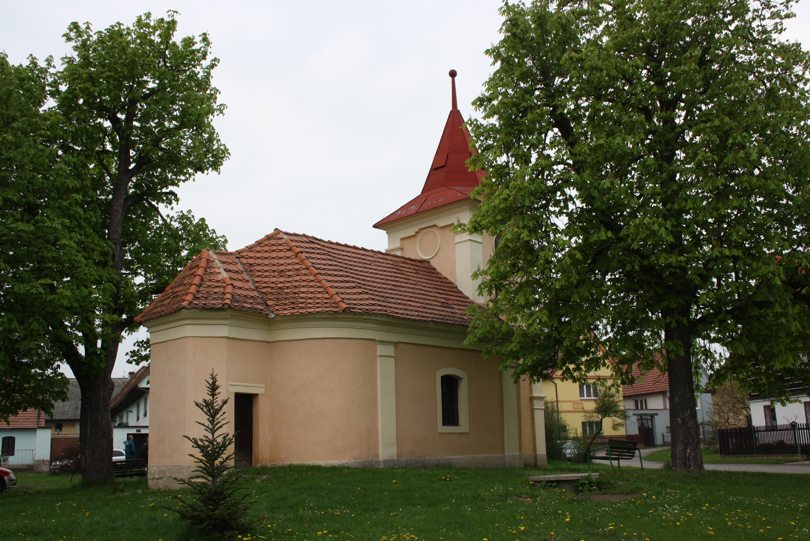 Kaplička na návsi v Polepech v okrese Litoměřice.